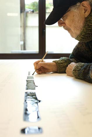 Emilio Isgrò